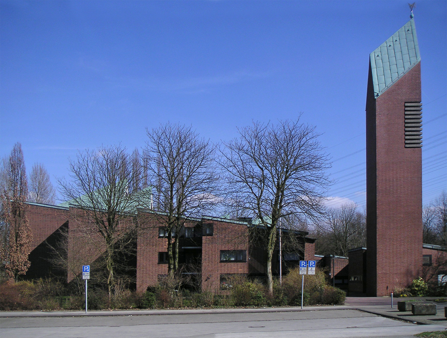 St. Thomas Morus, Gelsenkirchen-Ückendorf. Architekt: Gottfried Böhm